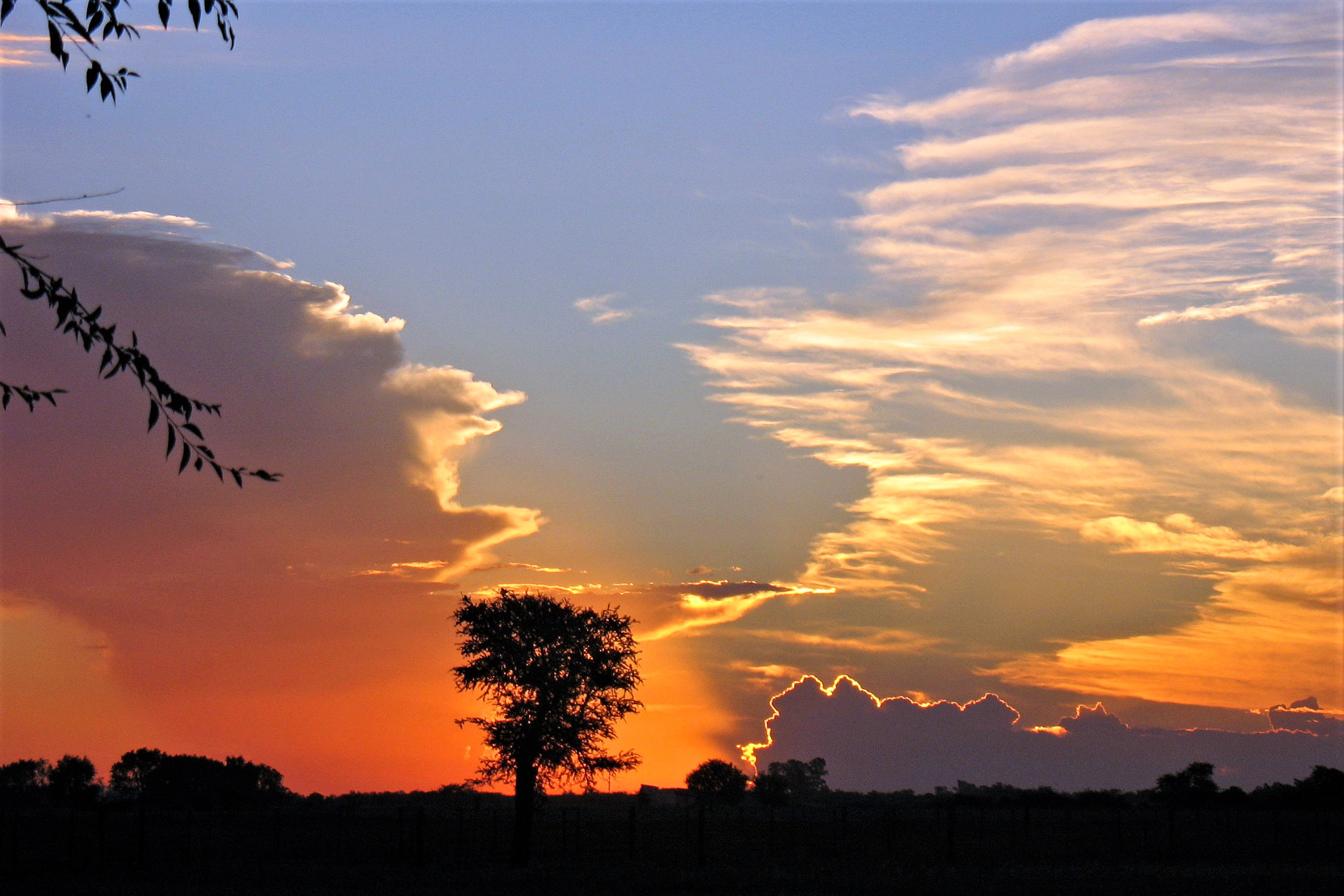 Descripción paisajística de la zona rural de Progreso (Santa Fe)